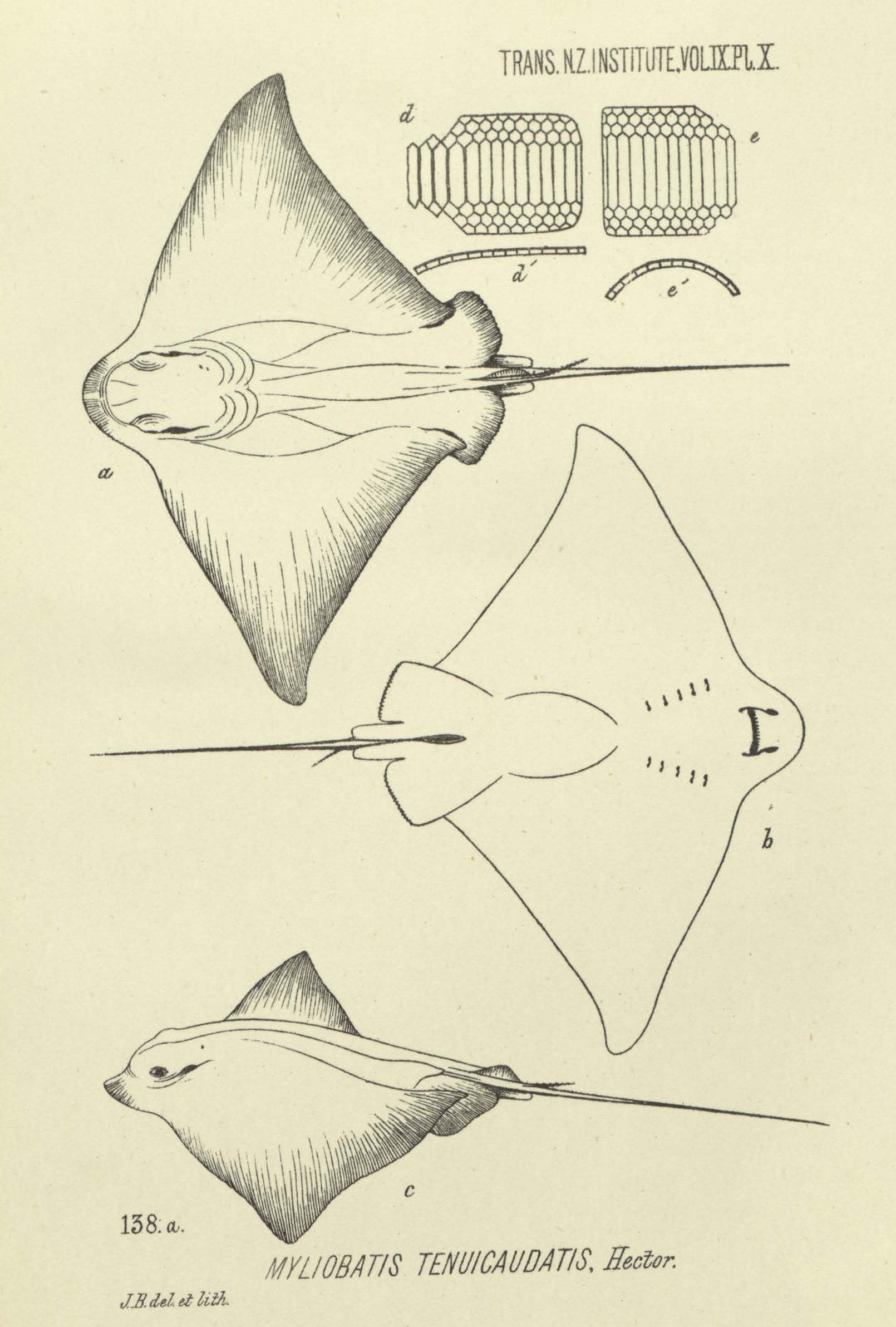 Скат рода орляков